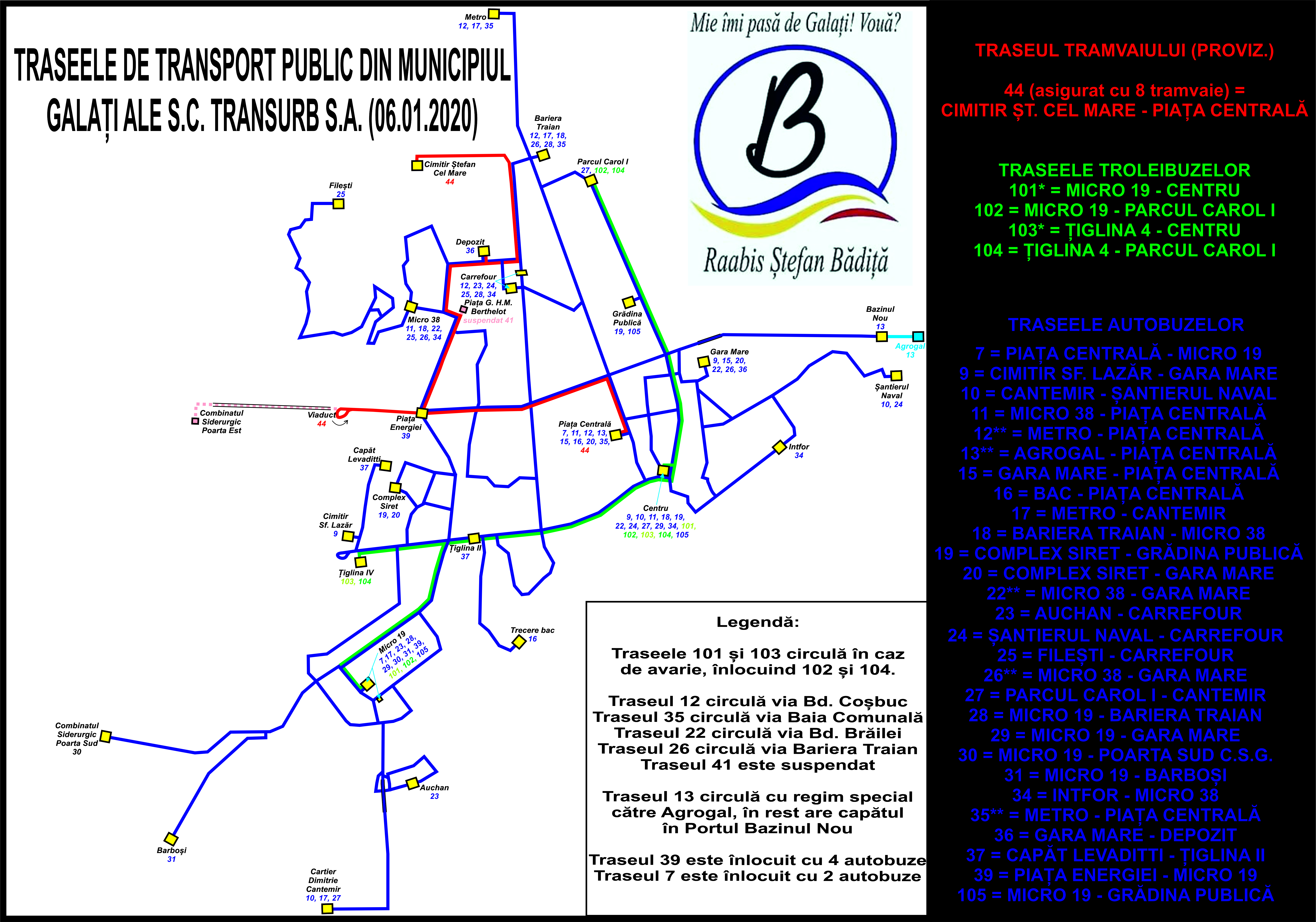 Harta traseelor de transport public din Galati